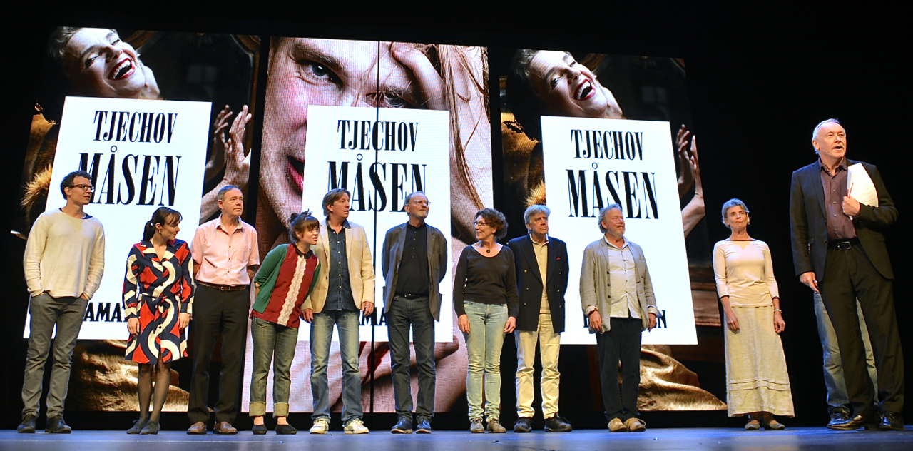 Skådespelare ur Måsen under Dramatens öppet hus i september 2014. Från vänster: Hannes Meidal, Rebecka Hemse, Per Mattson, Emma Mehonic, Per Svensson, Björn Granath, Eva Millberg, Hans Klinga, Bengt CW Carlsson och Stina Ekblad.